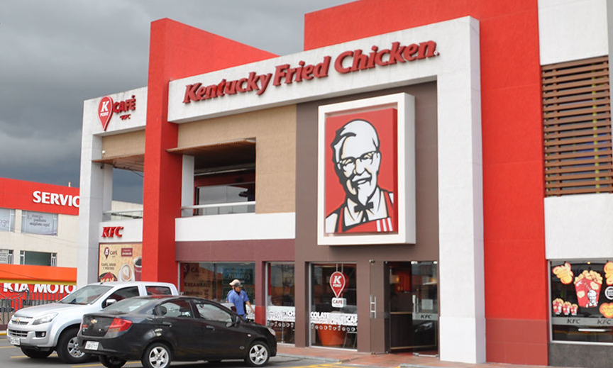 Local N° 79 de KFC en el Ecuador. Ubicado en el barrio de Cumbayá, al oriente de Quito.